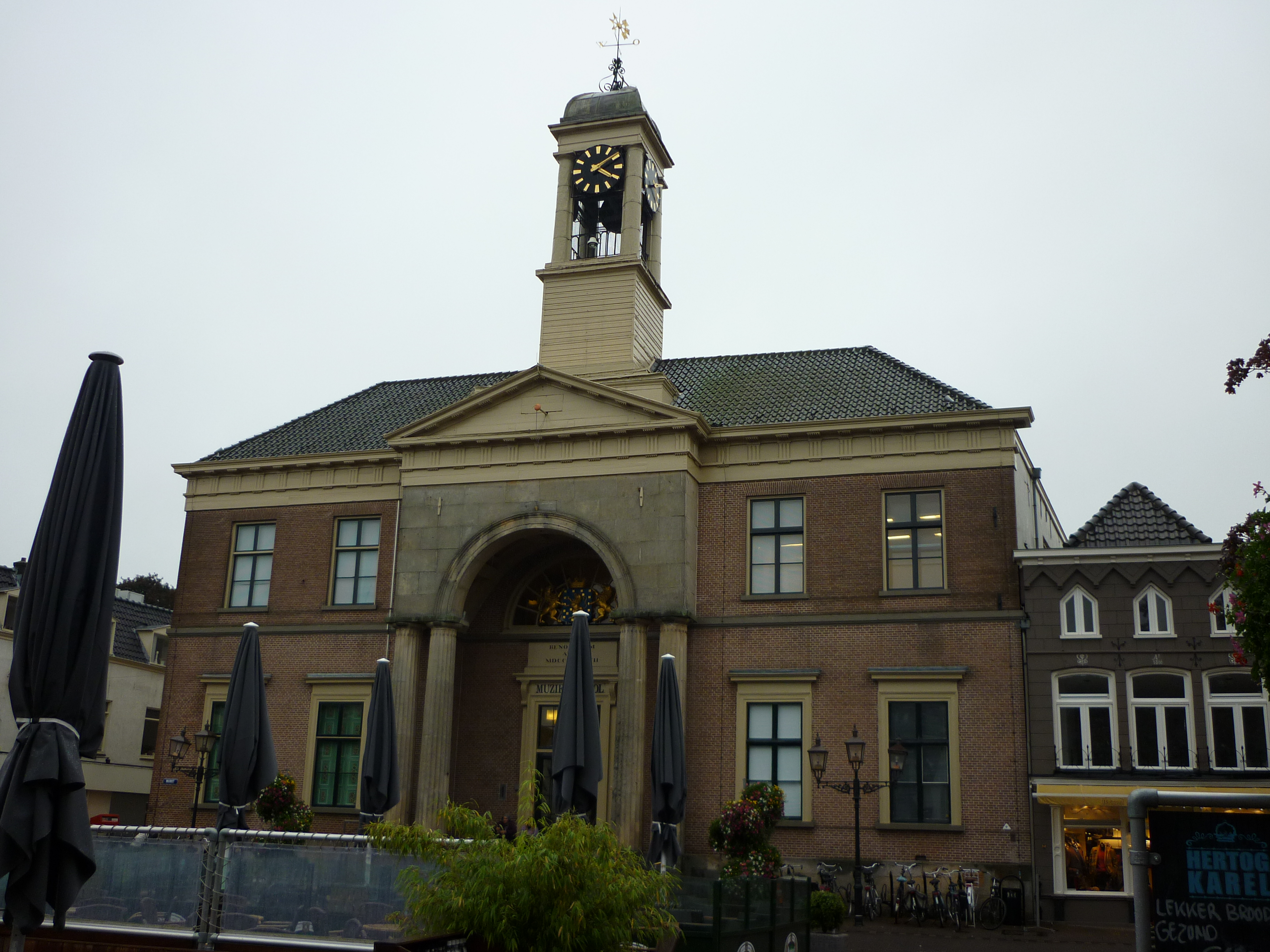 Muziekschool - Markt 1, Harderwijk, Gelderland